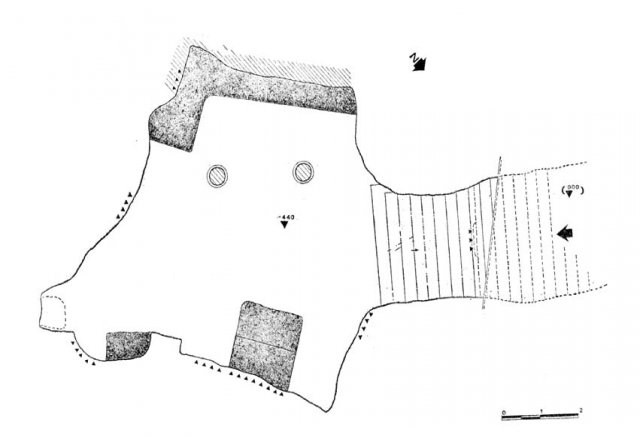 Cripta del Crocefisso planimetria Ugento, Lecce, Puglia, Italy